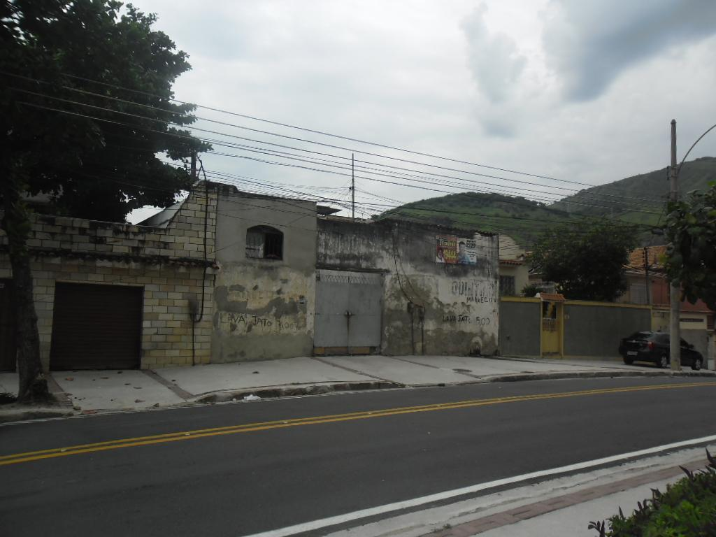 Sede do antigo rancho Aliados de Quintino.